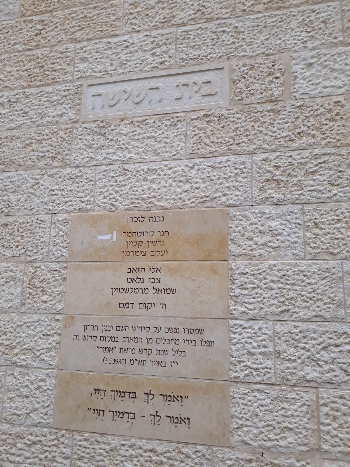 לוח הזכרון בבית השישה, בין בית הדסה לבית שניאורסון. הבניין הוקם לזכר ששת נרצחי הפיגוע בבית הדסה ב-1980